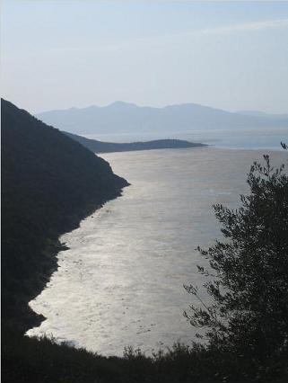 photo réalisée par Sadok GHARBI en août 2006